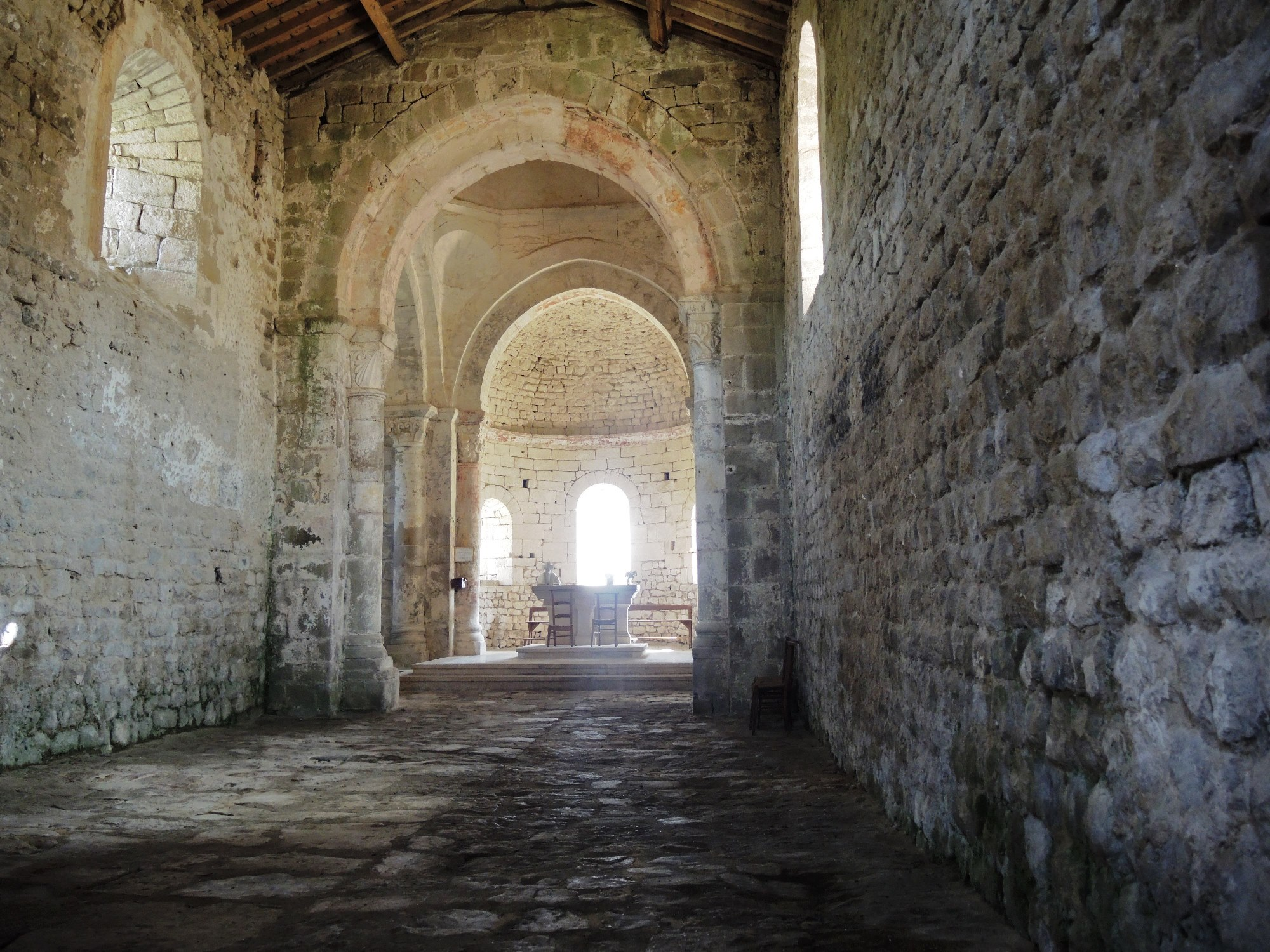 Veyrines St-Symphorien de Mahun nef et choeur